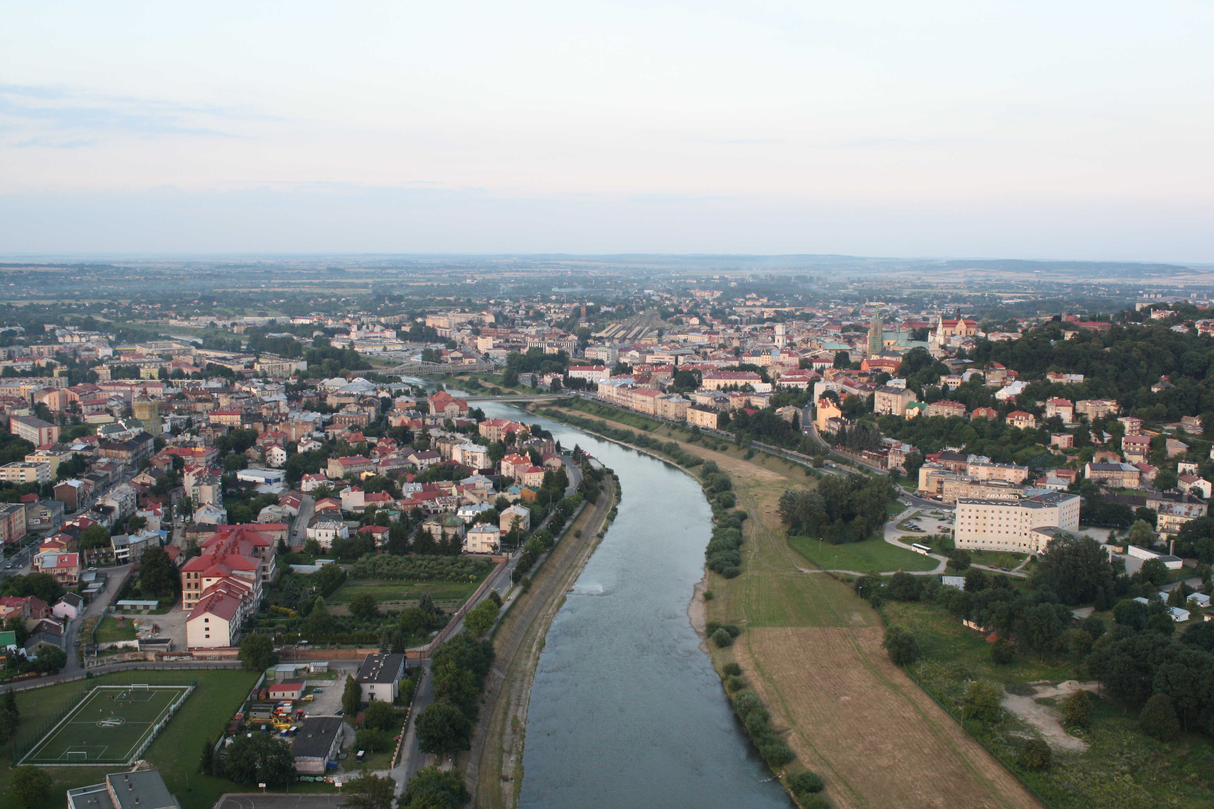 Przemyśl od zachodu